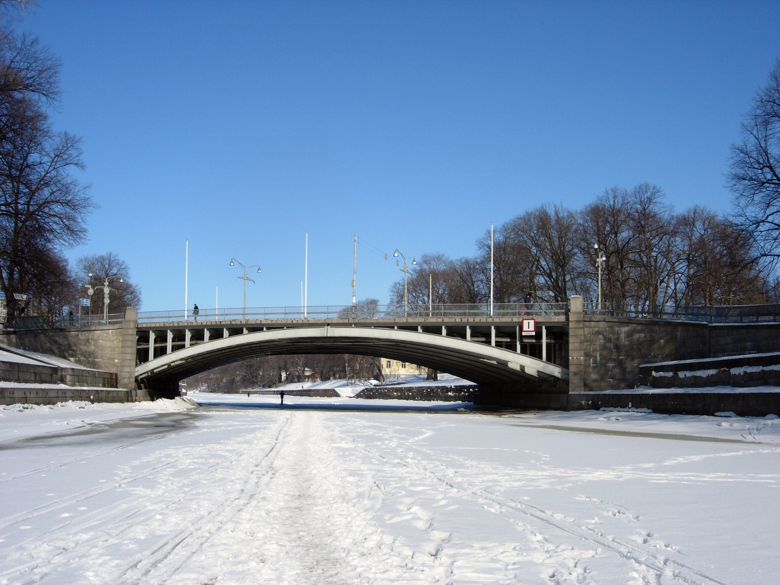 Tuomiokirkkosilta in Turku